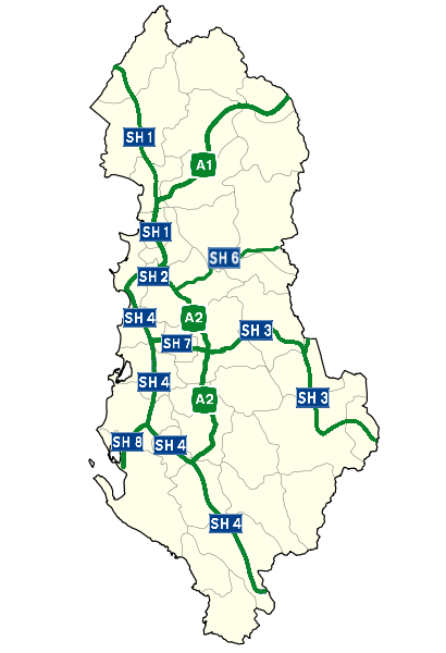 Karte Albaniens mit den Autobahnen und den dazugehörigen Schildern